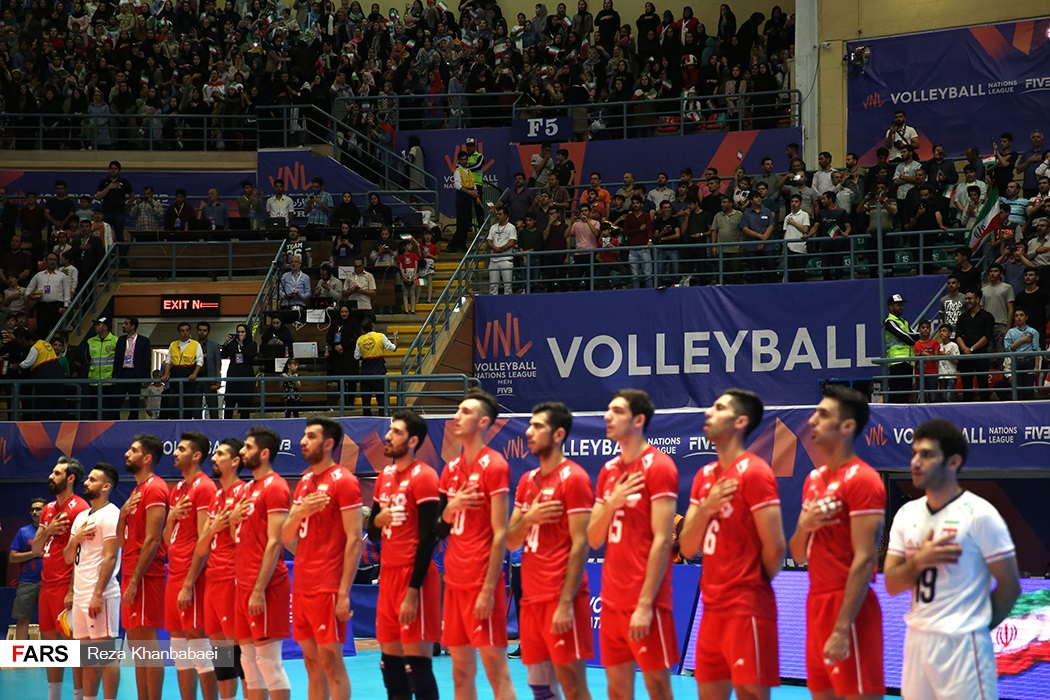 لیگ ملت‌های والیبال جهان ۲۰۱۹ - اردبیل| ایران ۳ - استرالیا ۰